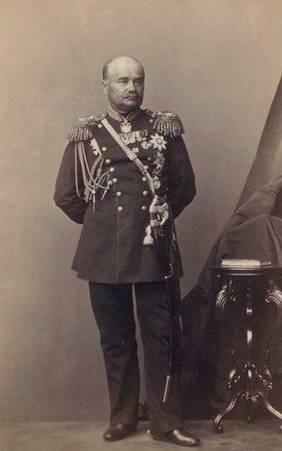 Граф Александр Алексеевич Баранцов (1810—1882) — генерал от артиллерии, начальник Главного артиллерийского управления.